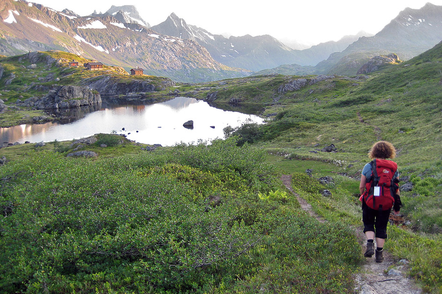 Snytindhytta i Vesterålen sees i øvre venstre bildekant.